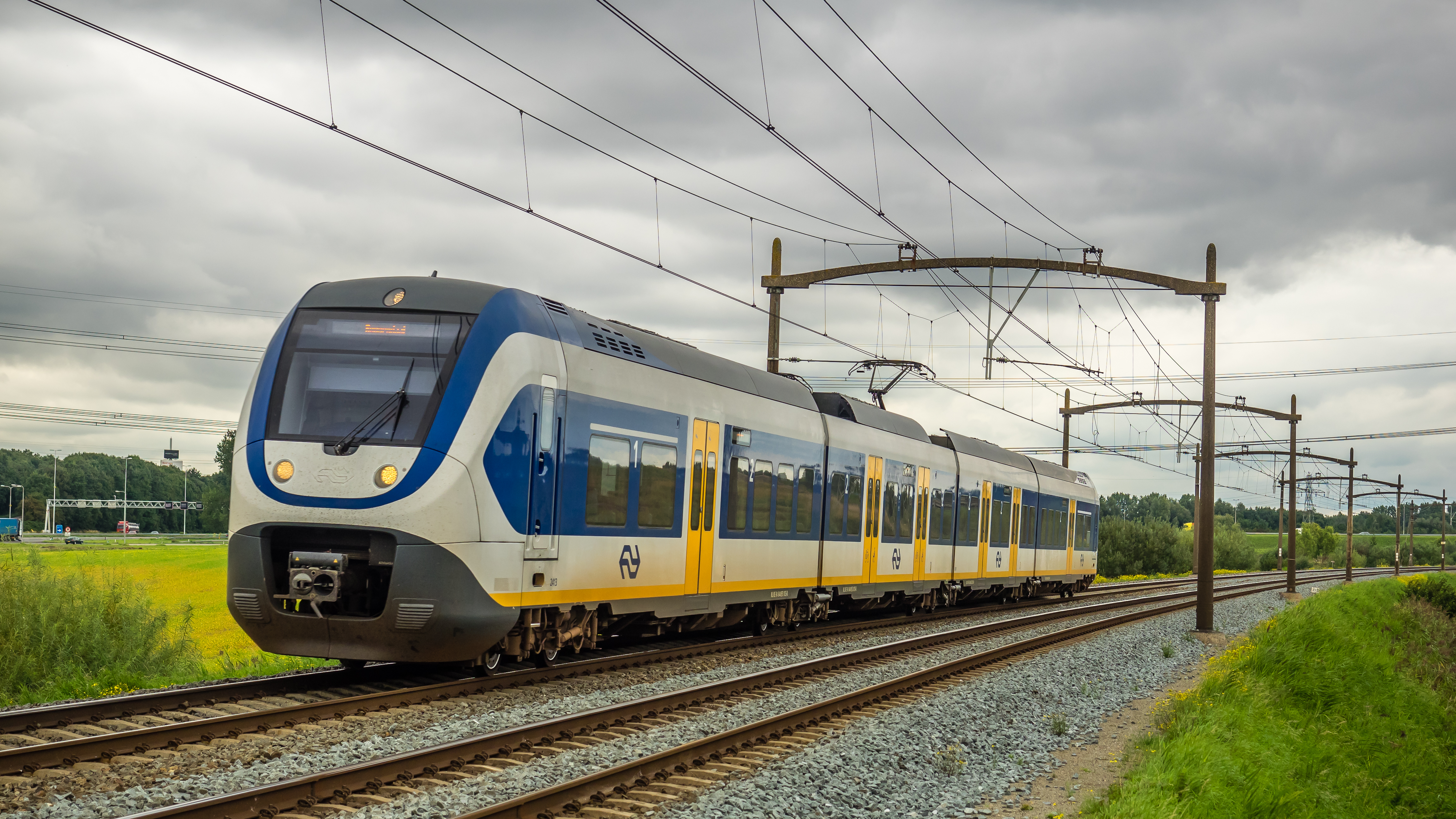 NSR - Sprinter Lighttrain (SLT) - Wieldrechtse Zeedijk - Dordrecht